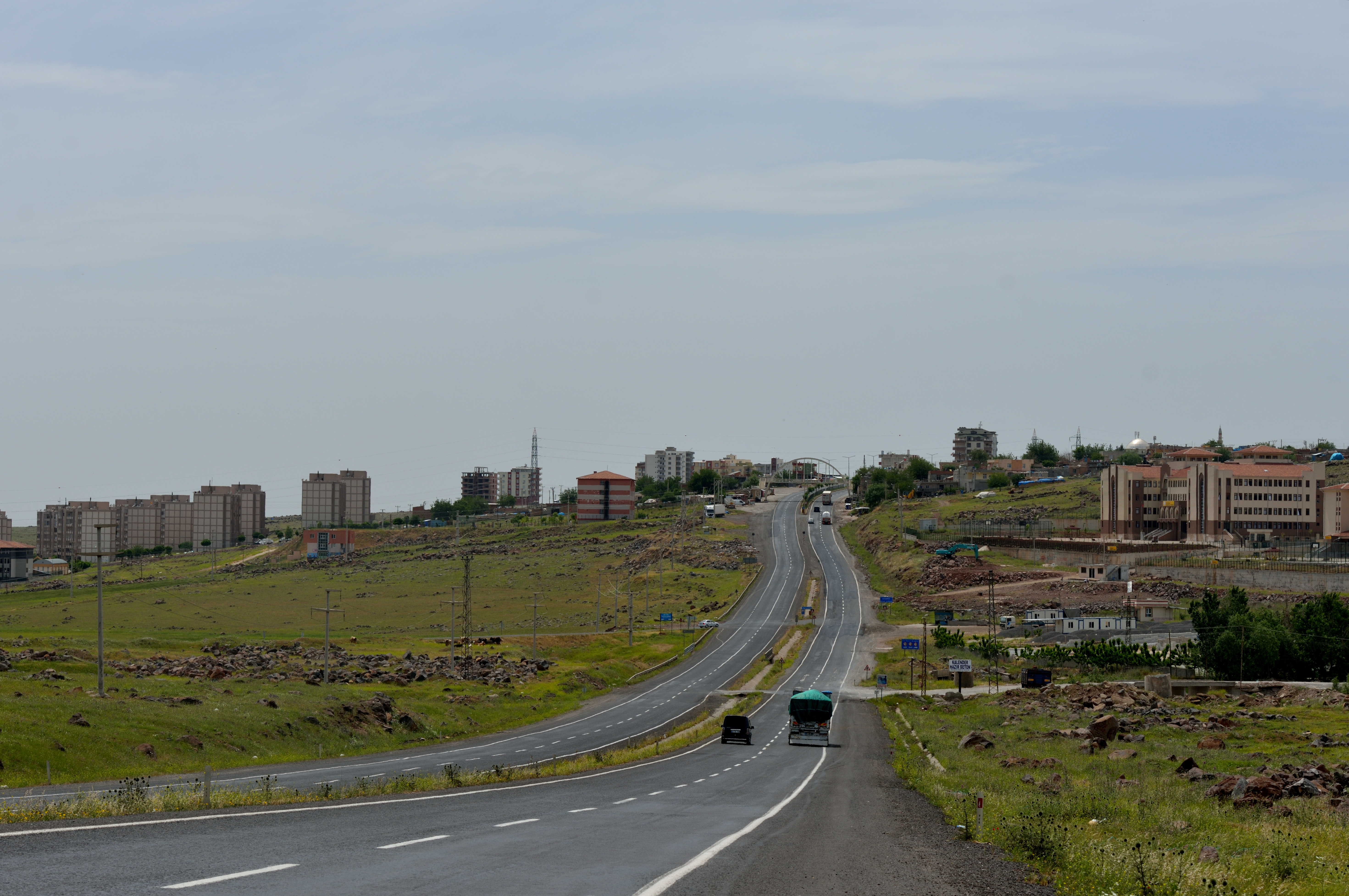 Kurdî: Dîmenek ji Sêweregê